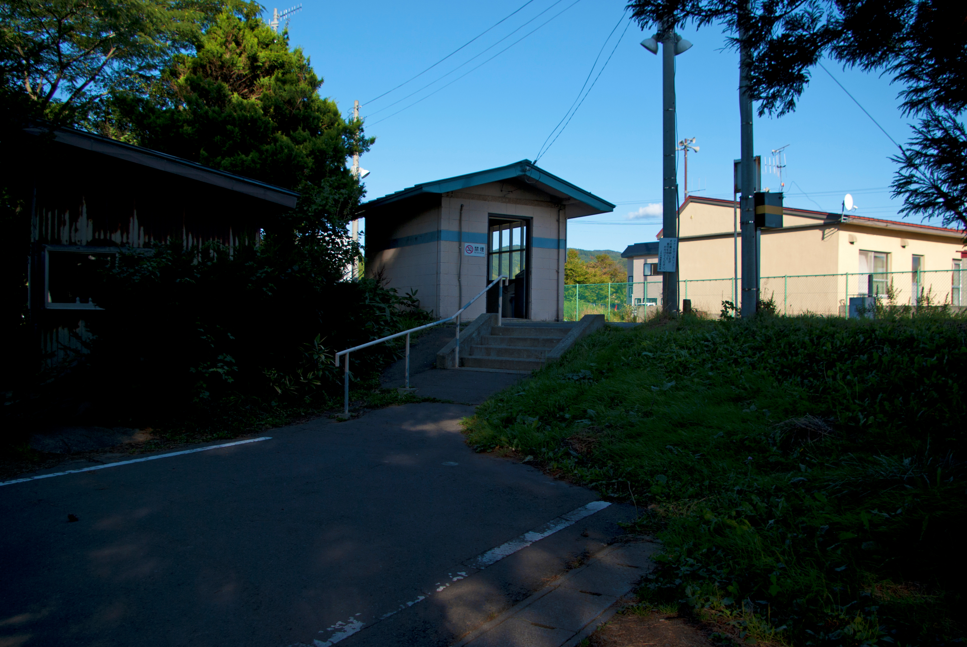 東日本旅客鉄道大湊線有畑駅